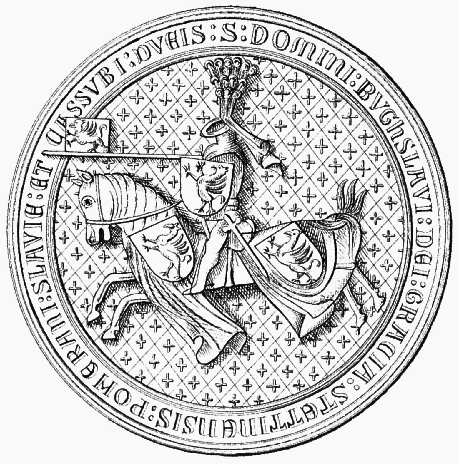 Reitersiegel von Herzog Bogislaw X. von Pommern